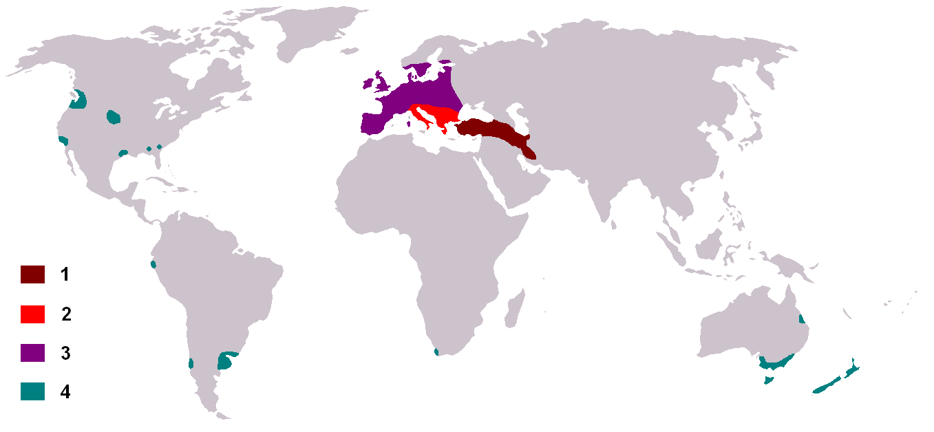 Dama dama distribution map - خريطة إنتشار الأيل الأسمر الأوروبي - מפה של תפוצת היחמור כיום בעולם 1 Native - بلديقديم - ילידים 2 Possibly native, or very early introductions by humans (before c.1000) - ייתכן ילידים 3 Early introductions by humans (before c.1900) - إدخال قديم، قبل القرن العشرين - היה קיים באזור בעבר ושב לטבע 4 Modern introductions by humans (after c.1900) - إدخال حديث - מוכר לאנושות המודרנית